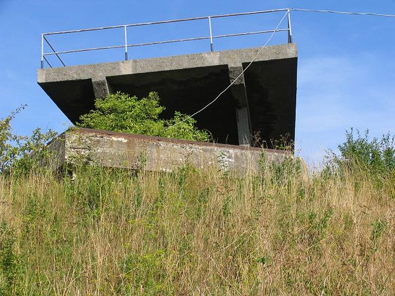 Kongelundsfortet, radarplatform